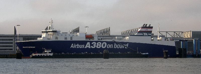 Die Ville de Bordeaux beim Aufladen der Flugzeugteile in Hamburg